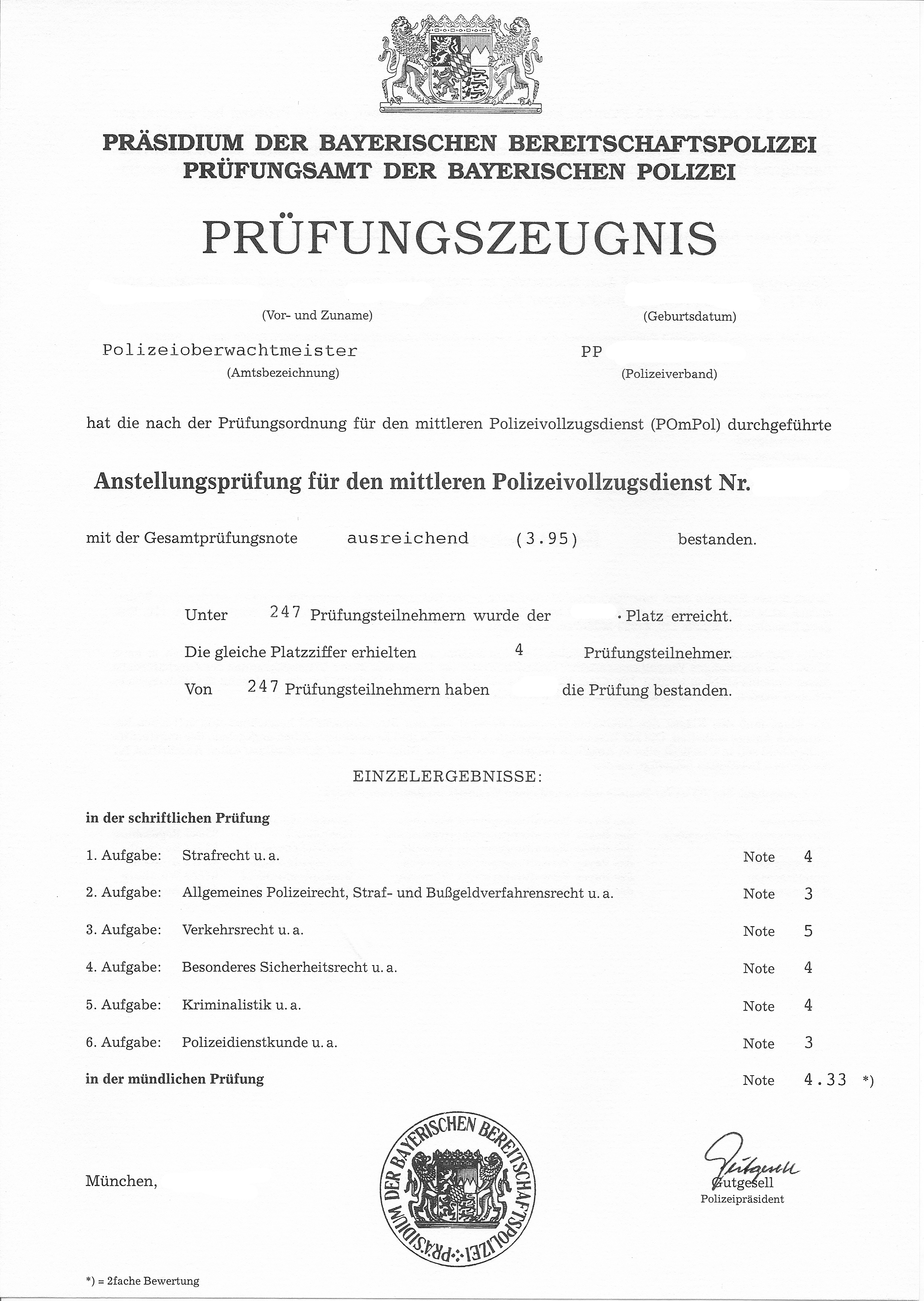 einige Felder unkenntlich gemacht